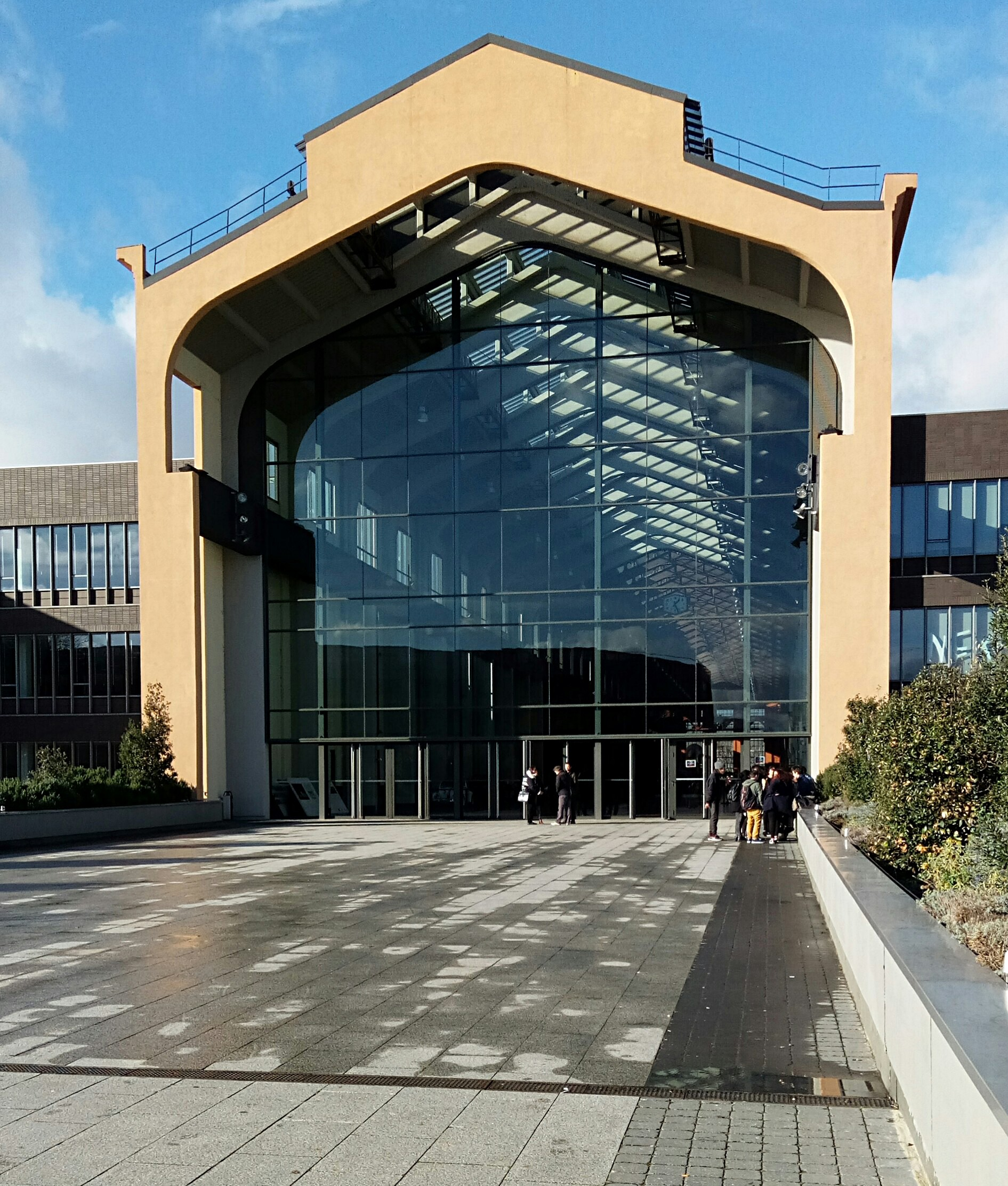 Entrée principale de la nef, Cité du Cinéma, Saint-Denis, Seine-Saint-Denis, France.